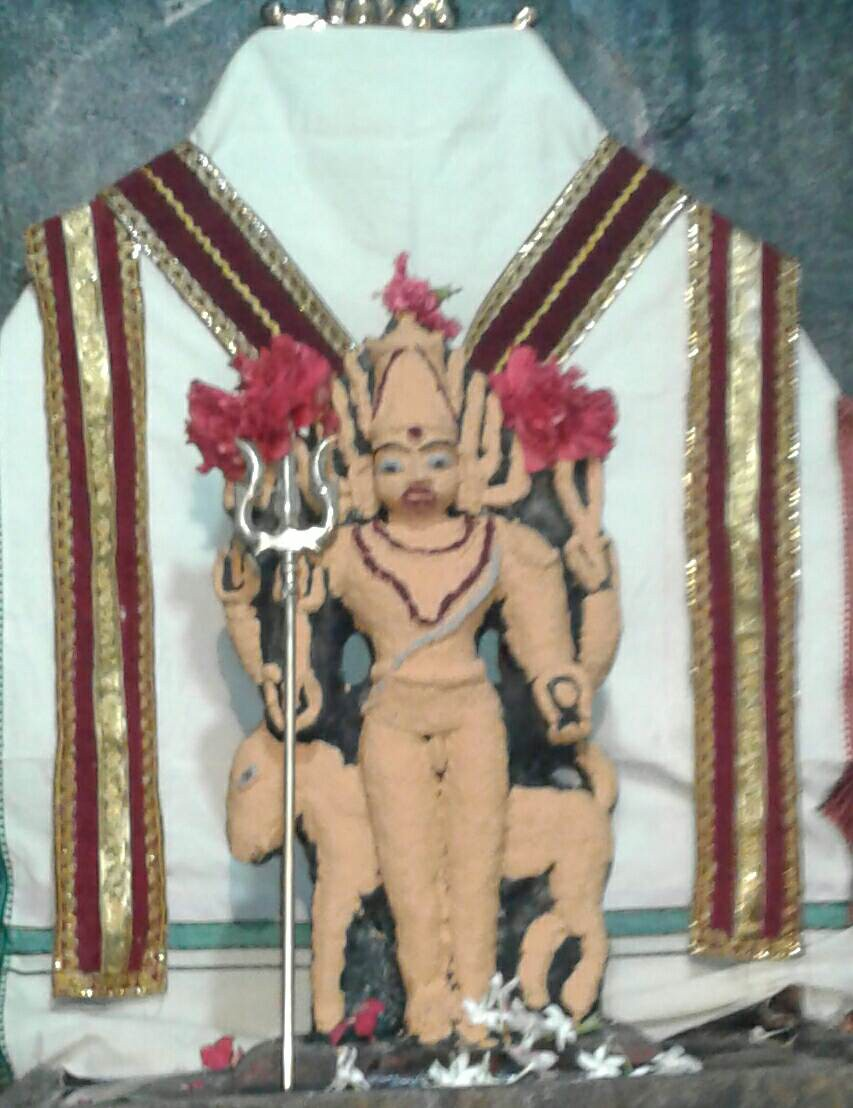 சந்தன காப்பு சத்தபட்ட மூல வைரவர்